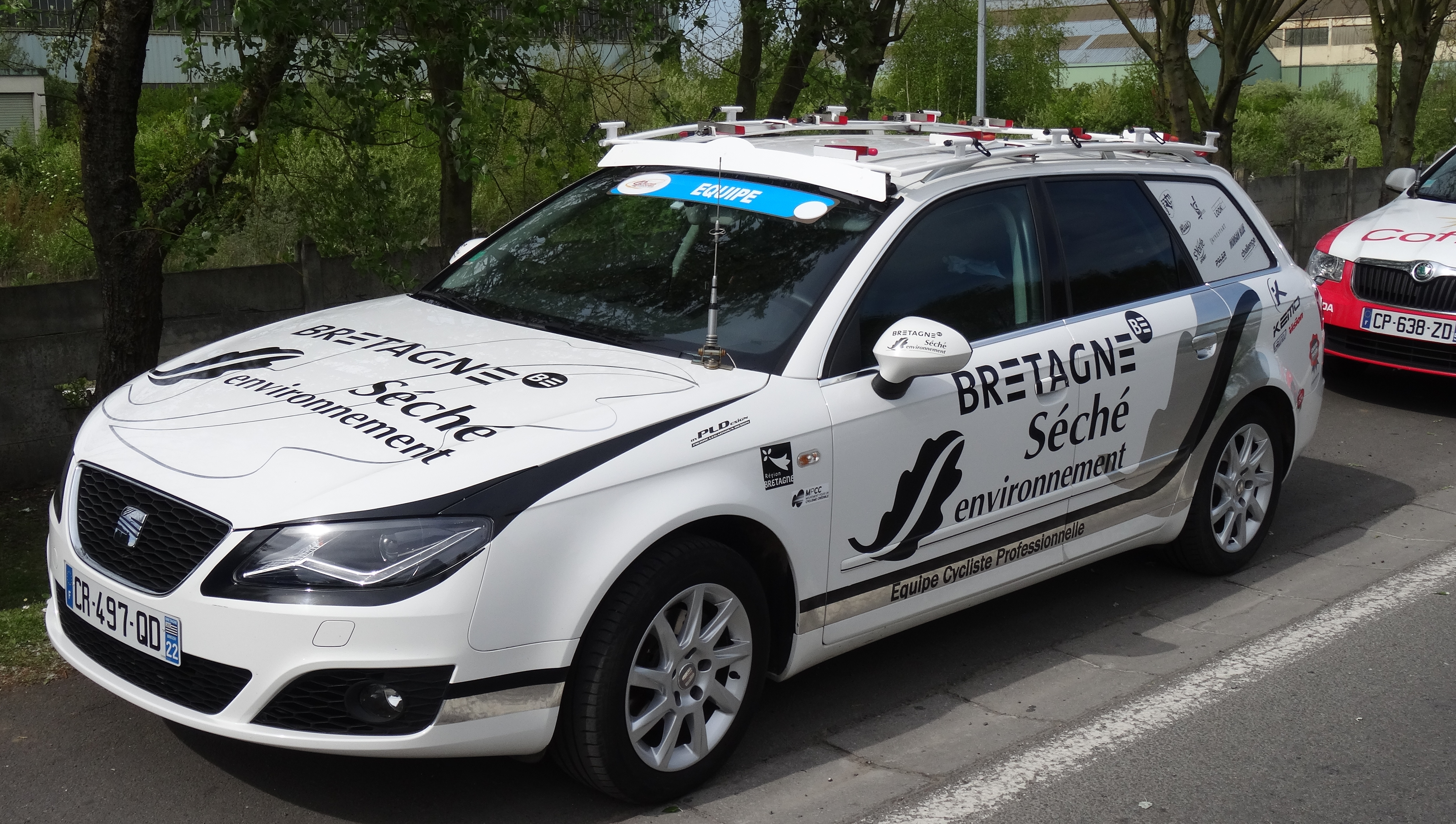 Reportage réalisé le jeudi 17 avril à l'occasion du départ et de l'arrivée du Grand Prix de Denain 2014 à Denain, Nord, Nord-Pas-de-Calais, France.